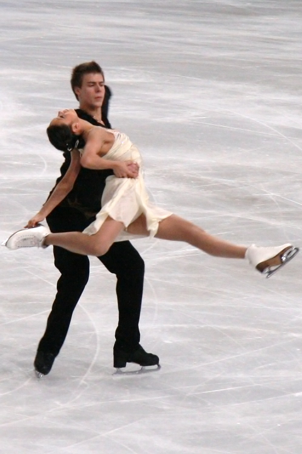 Елена Ильиных и Никита Кацалапов на 2011 Trophée Eric Bompard